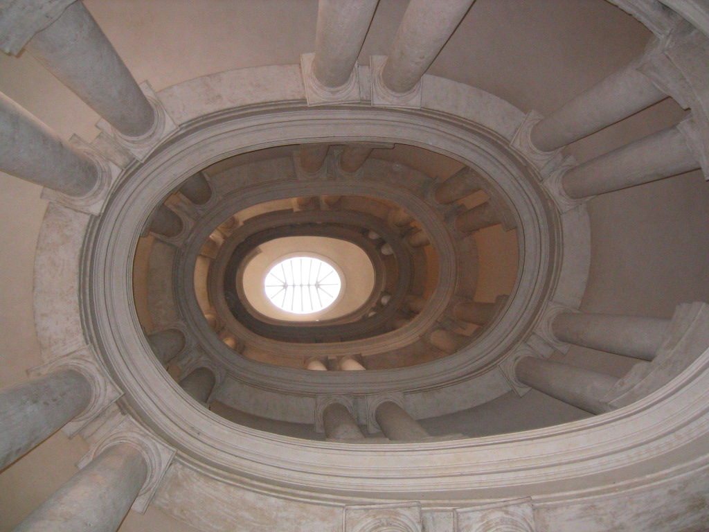 Treppenhaus im "Palazzo Barberini" in Rom.